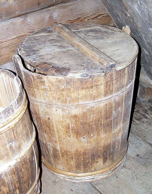 Holk, lagget av gran og brukt til oppbevaring av korn eller mel i Gaular i Sogn og Fjordane. Bredde 77 cm. Foto Haakon Harriss / Norsk Folkemuseum, NFL.11101.